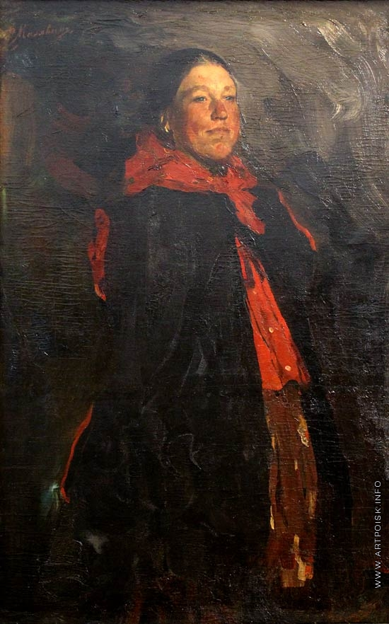 Девушка Год создания Начало 1900-х Материал Холст, масло Собрание Национальный художественный музей Республики Беларусь